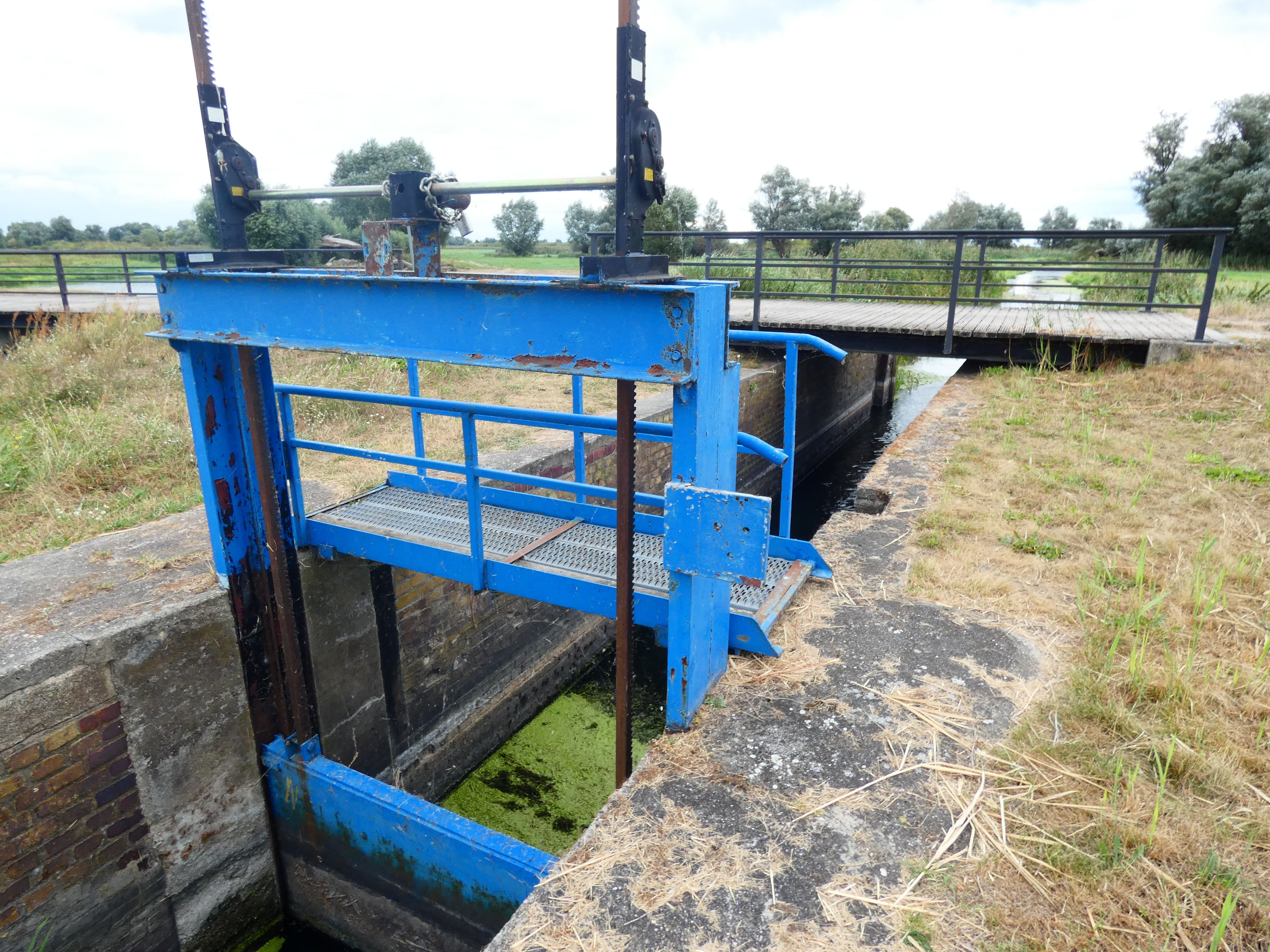 Altes Schleusenbecken von Gülper Havel zum Gülper See beim Nadelwehr Gülpe im separaten Schleusengraben.